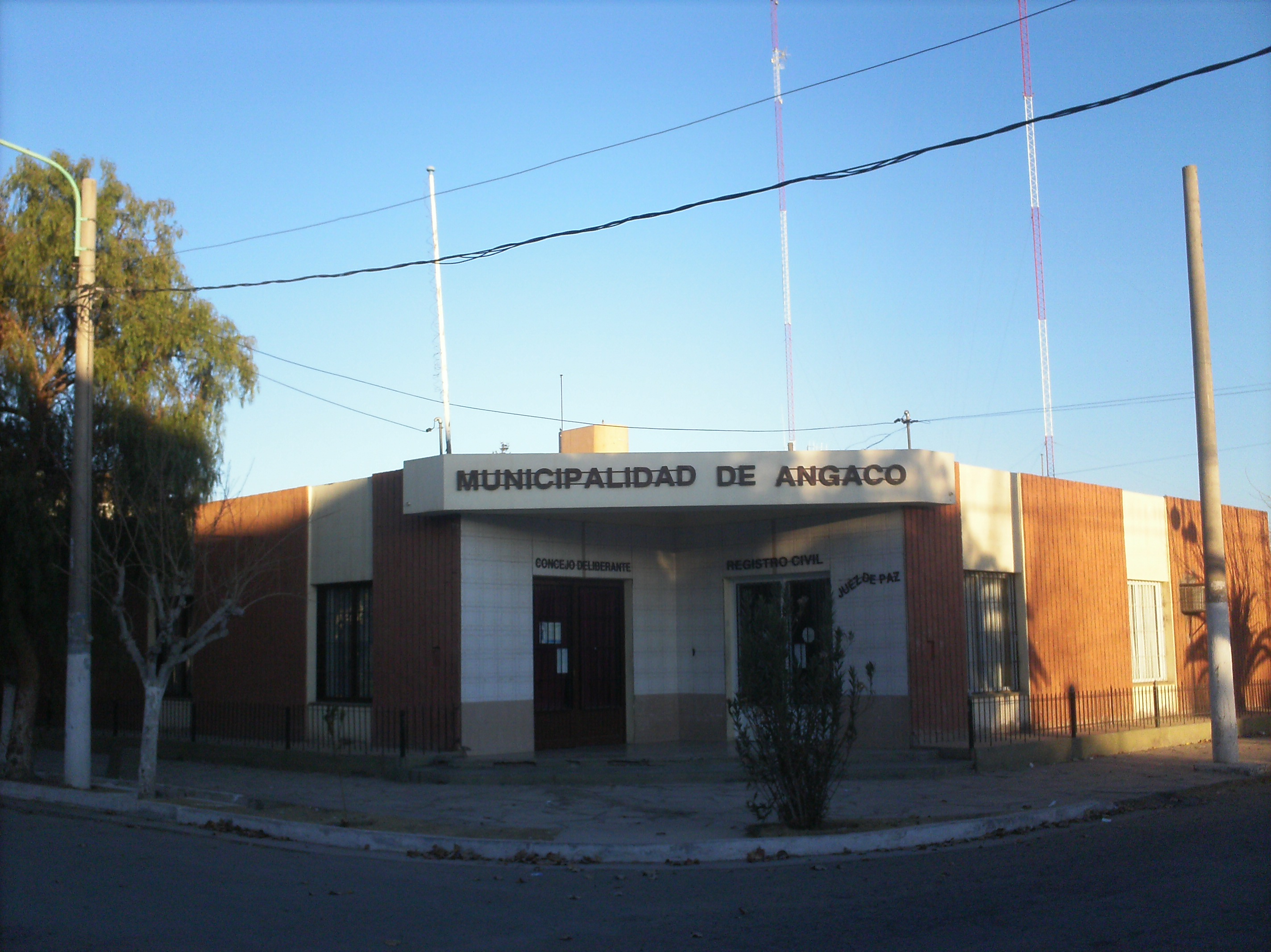 la municipalida de la capital angaqueña